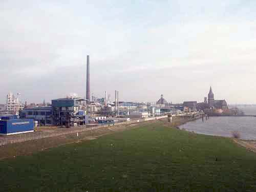 Emmerich waterfront gezien vanaf de brug